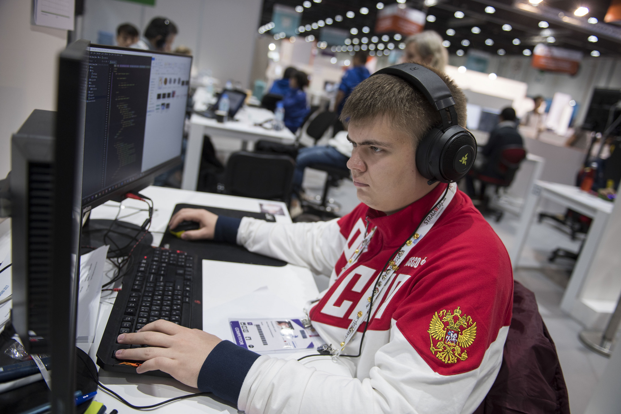 Блок "Информационные и коммуникационные технологии". Компетенция "Web-дизайн". Фото сделано на чемпионате WorldSkills 2017 в Абу-Даби (ОАЭ)